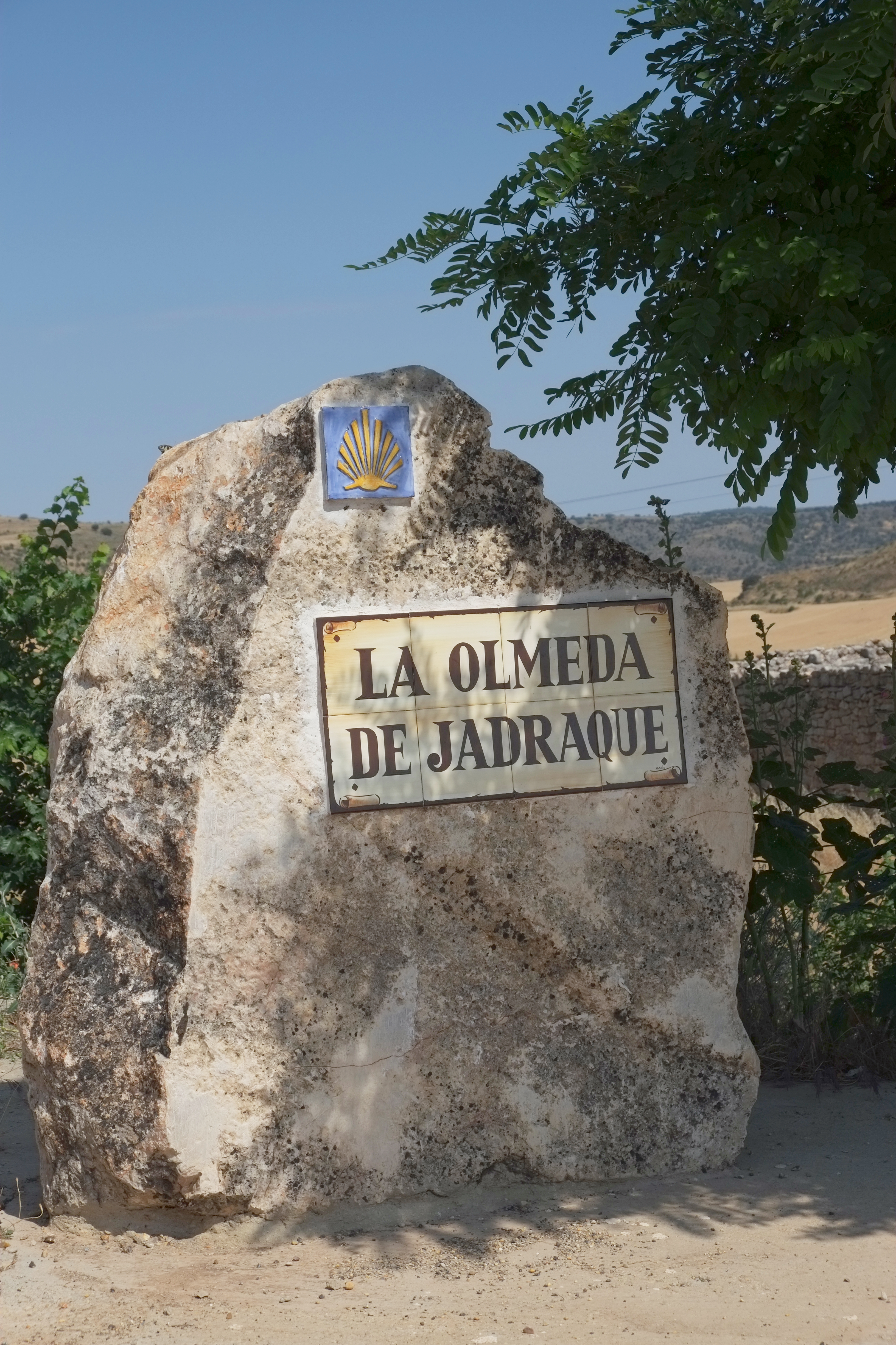 Kirche in La Olmeda de Jadraque in der Provinz Guadalajara in Spanien